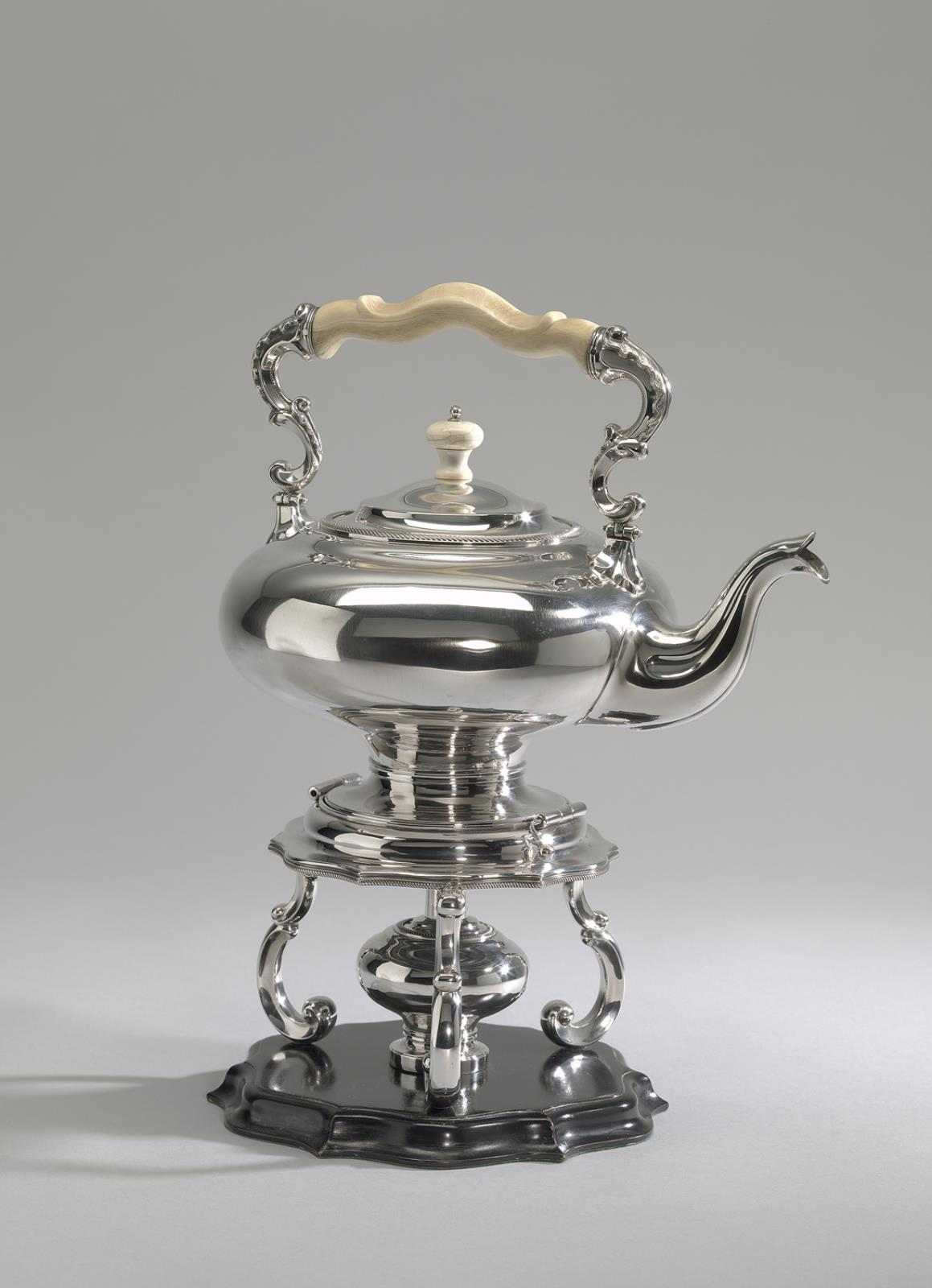 IdentificatieTitel: Waterketel op komfoor met brander Objectnummer: 3871.1/2Objecttype: ketel waterketel komfoor brander VervaardigingVervaardiger: Pieter Pieterse (goud- en zilversmid) Bonebakker (goud- en zilversmid) Datering: 1860 Geproduceerd in: AmsterdamAmsterdamMateriaal: zilver ivoor hout Afmetingen: cm (hoogte) x cm. (breedte) x cm. (diepte) x gr (gewicht)Verwerving en rechtenVerworven: schenking 1 december 2017Licentie: CC CC0Naamsvermelding: Amsterdam MuseumDuurzaam webadres